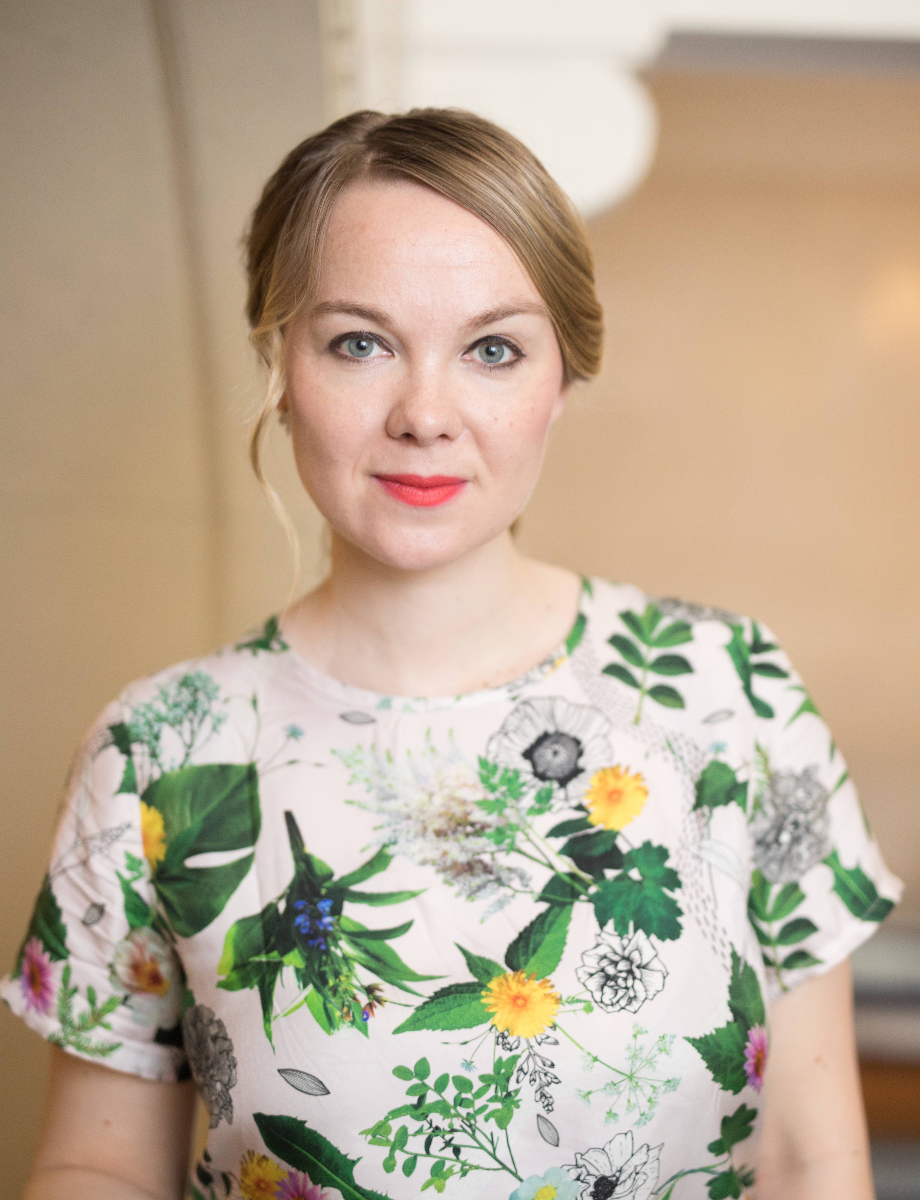 Elinkeinoministeri Katri Kulmuni virallisessa valokuvassa. Kuva Valtioneuvoston kuvapankista.